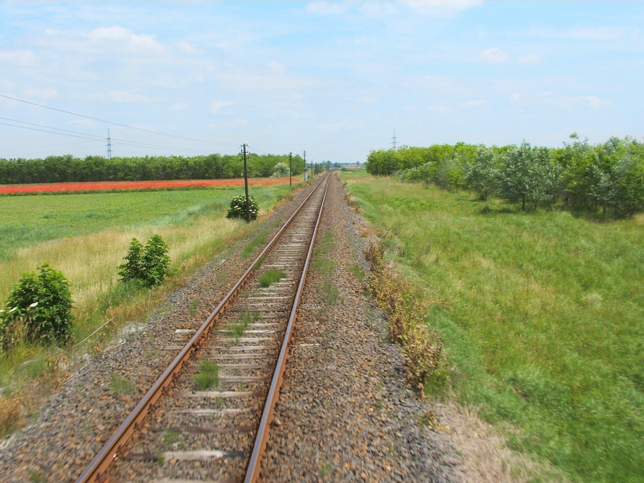 Pályarészlet a Szolnok–Kiskunfélegyháza-vasútvonalon (Tiszaalpár és Kiskunfélegyháza között)